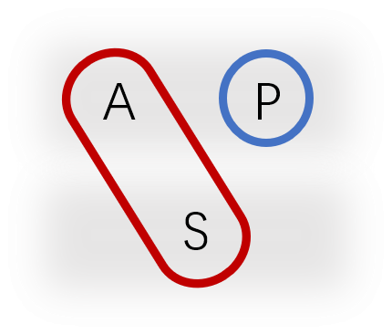 中文（中国大陆）: 句法形态配列，AS-P